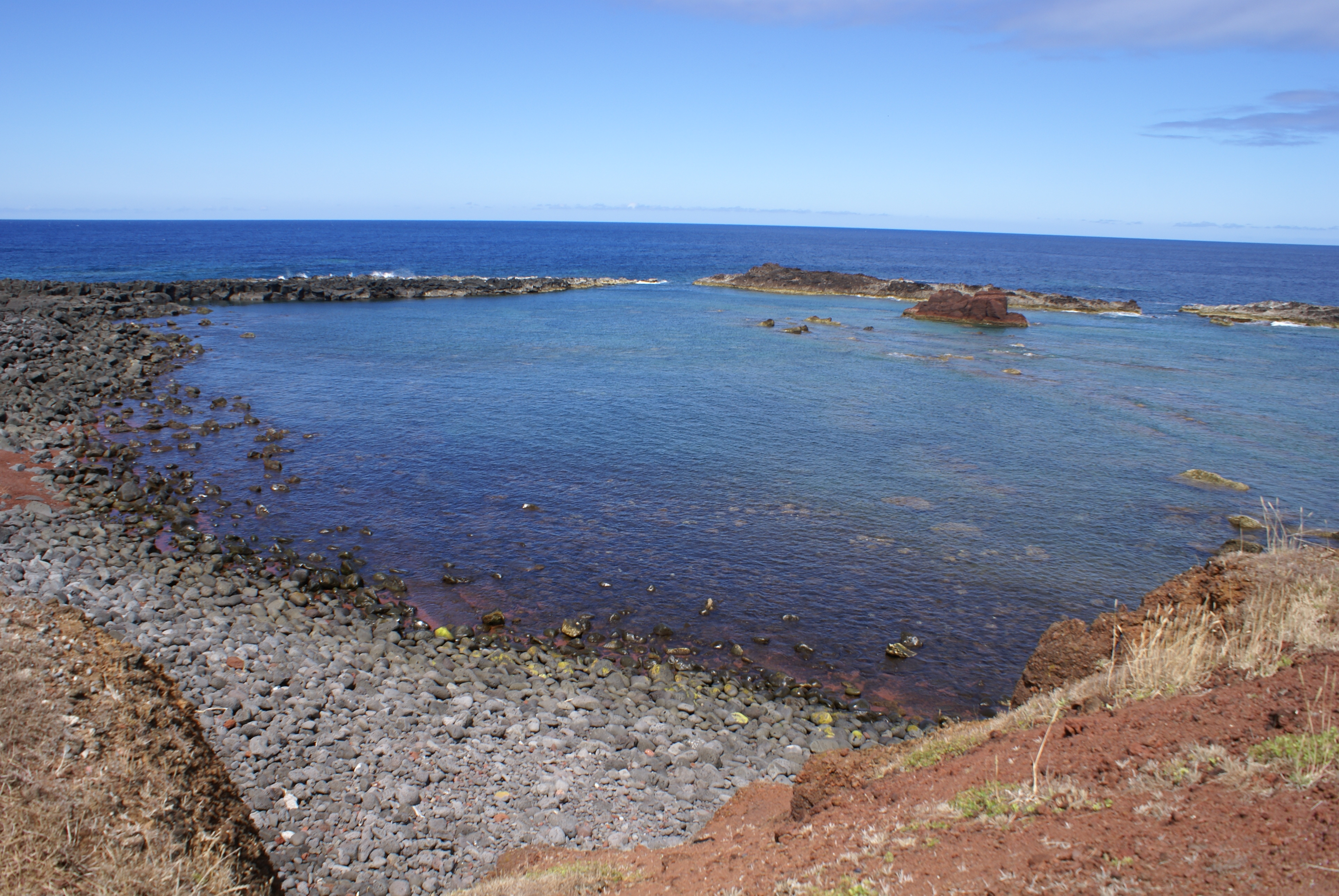 Barro Vermelho, Baía, Parque Natural da Graciosa, Santa Cruz da Graciosa, ilha Graciosa, Açores, Portugal